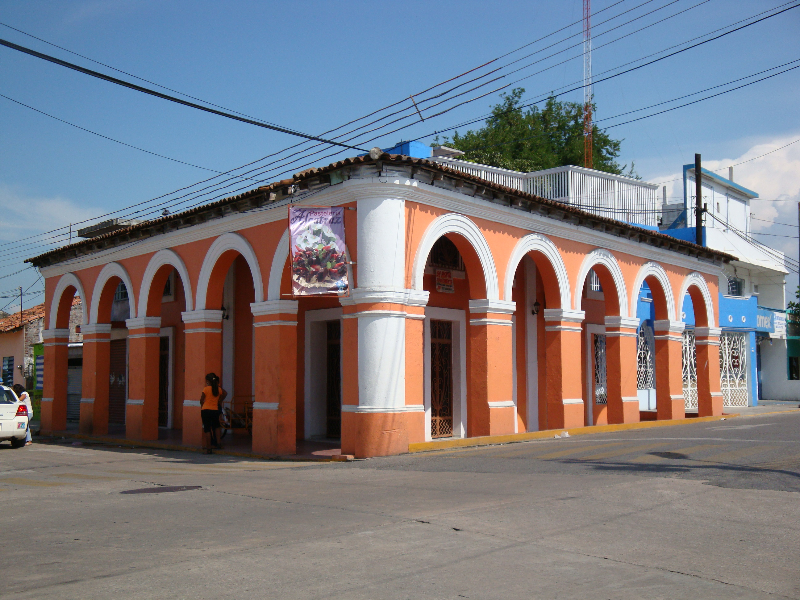 Casa antigua en el centro de la ciudad de Nacajuca, hoy pastelerìa, estado de Tabasco, México.